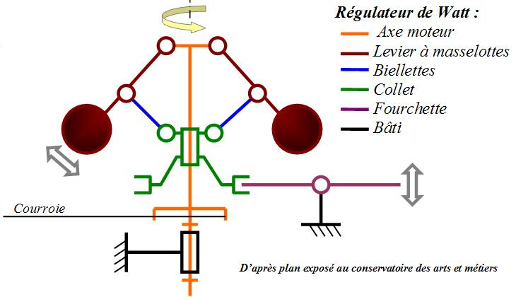 Principe du régulateur de Watt à effet centrifuge. Schéma cinématique plan normalisé.